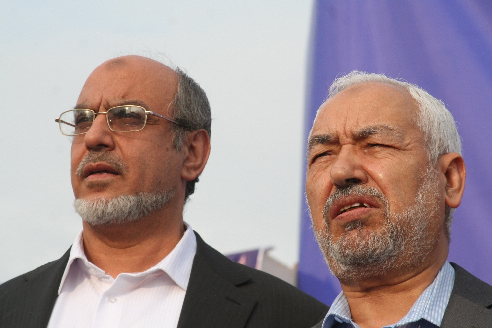 Rached Ghannouchi et Hamadi Jebali, président et secrétaire général du parti Ennahda